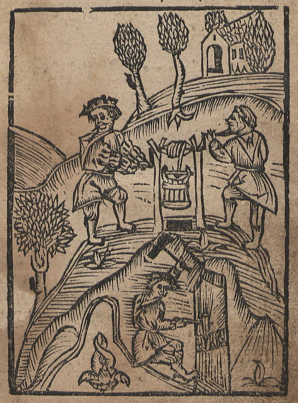 Original image description from the Deutsche FotothekBergbau